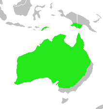 Habitat map of Artamus cinereus